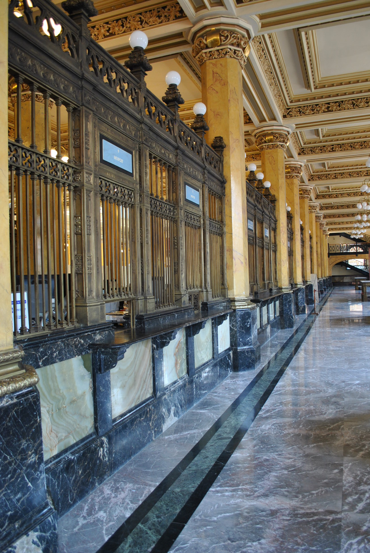 Fotografia del interior de la oficina postal mexicana